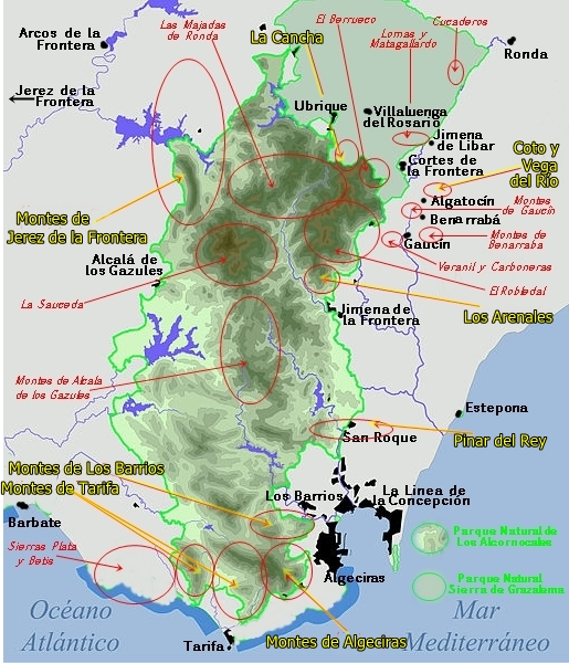 Situación de los alcornocales públicos andaluces. Resaltados aquellos cuyo Proyecto de Ordenación fue redactado por José García-Blanco Romero.